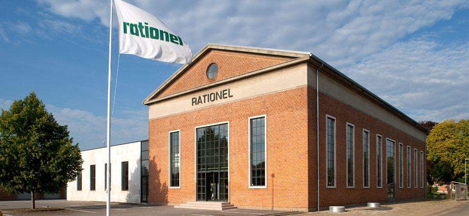 Hovedsædet for Rationel Vinduer A/S i Herning